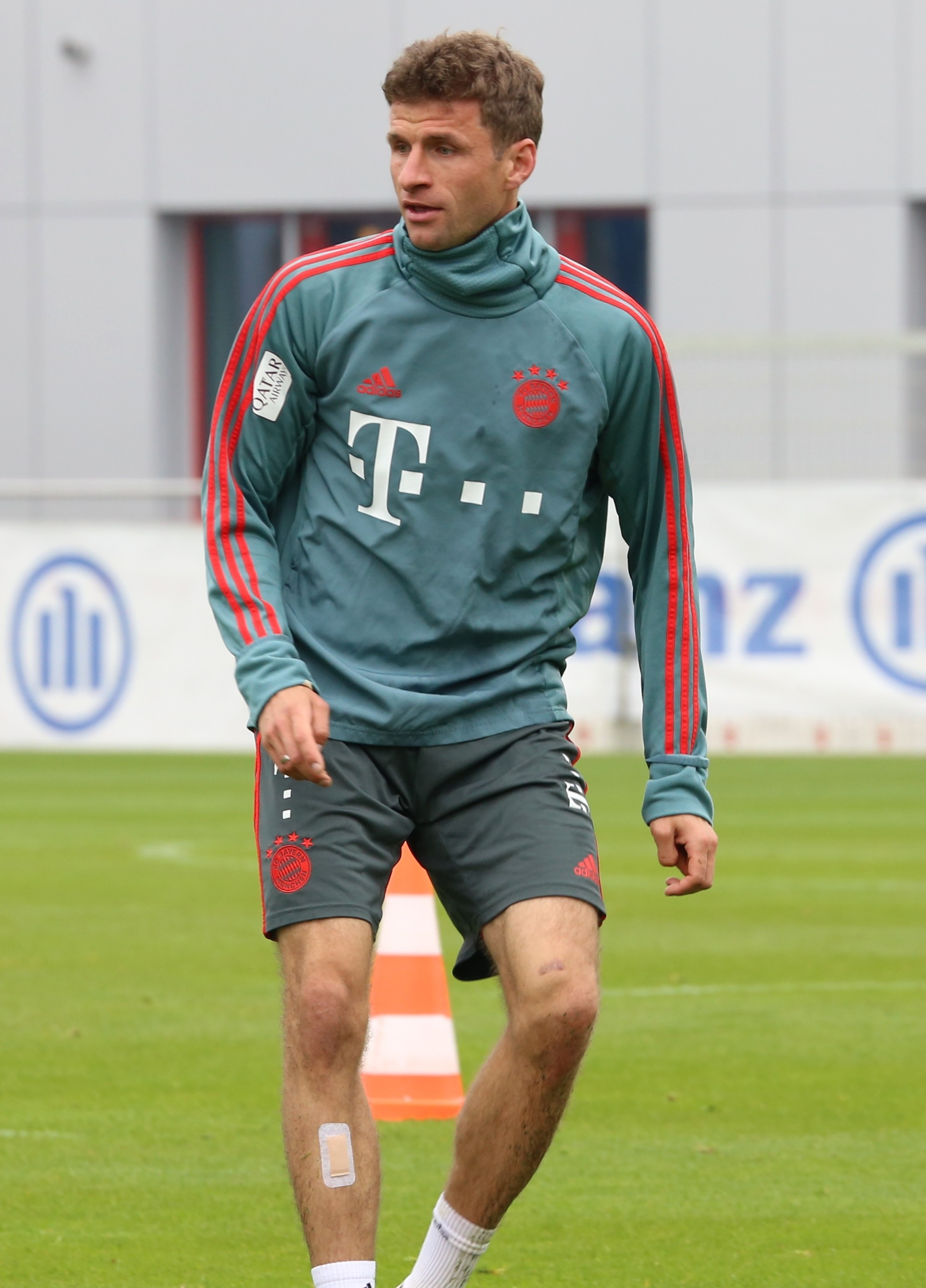 Thomas Müller, am 10. April 2019 beim Training auf dem Gelände des FC Bayern München